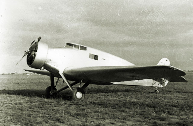 Avión de la Fábrica Militar de Aviones de Córdoba